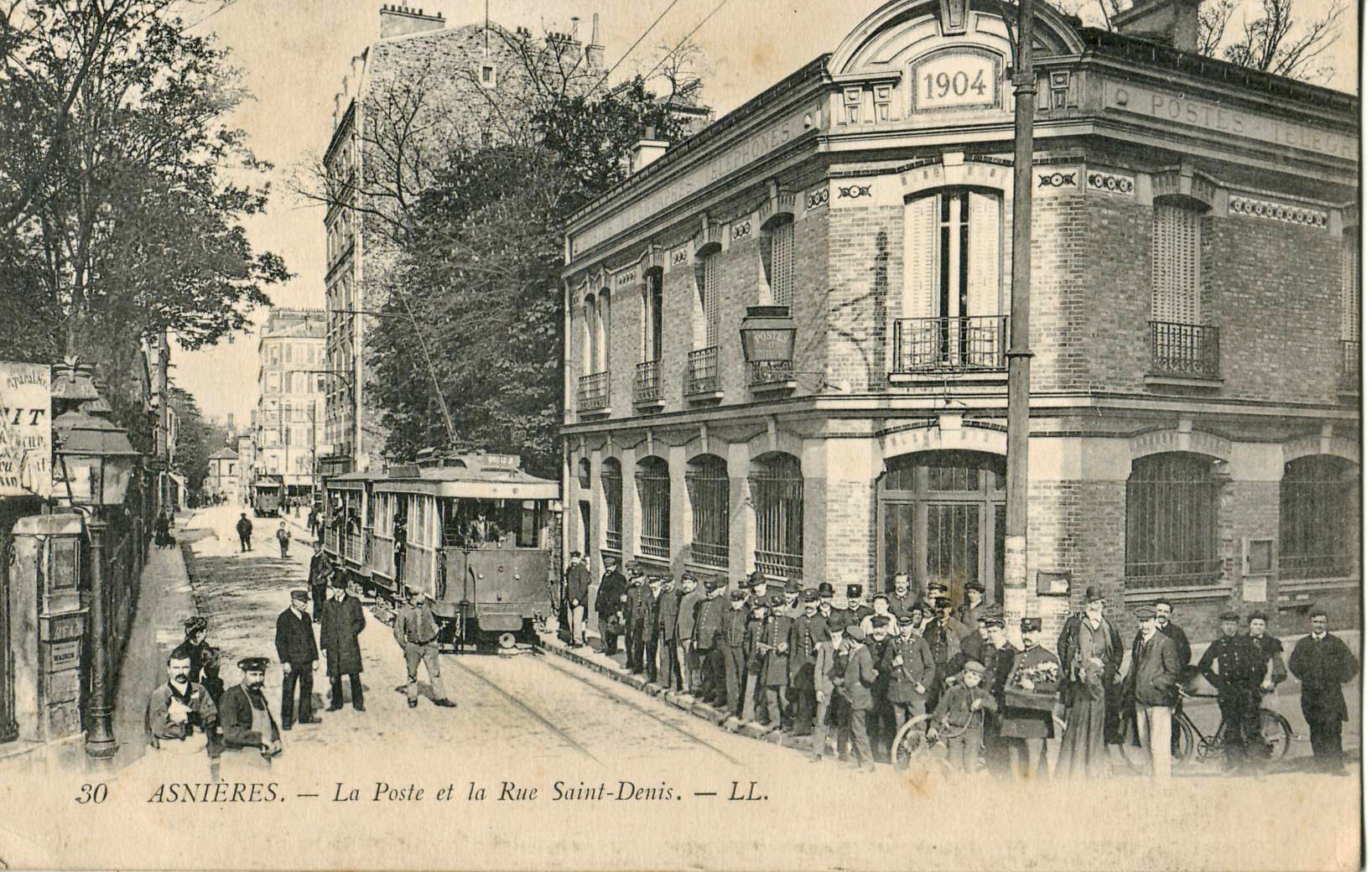 Carte postale ancienne éditée par LL, n°30 : ASNIÈRES - La Poste et la Rue Saint-Denis